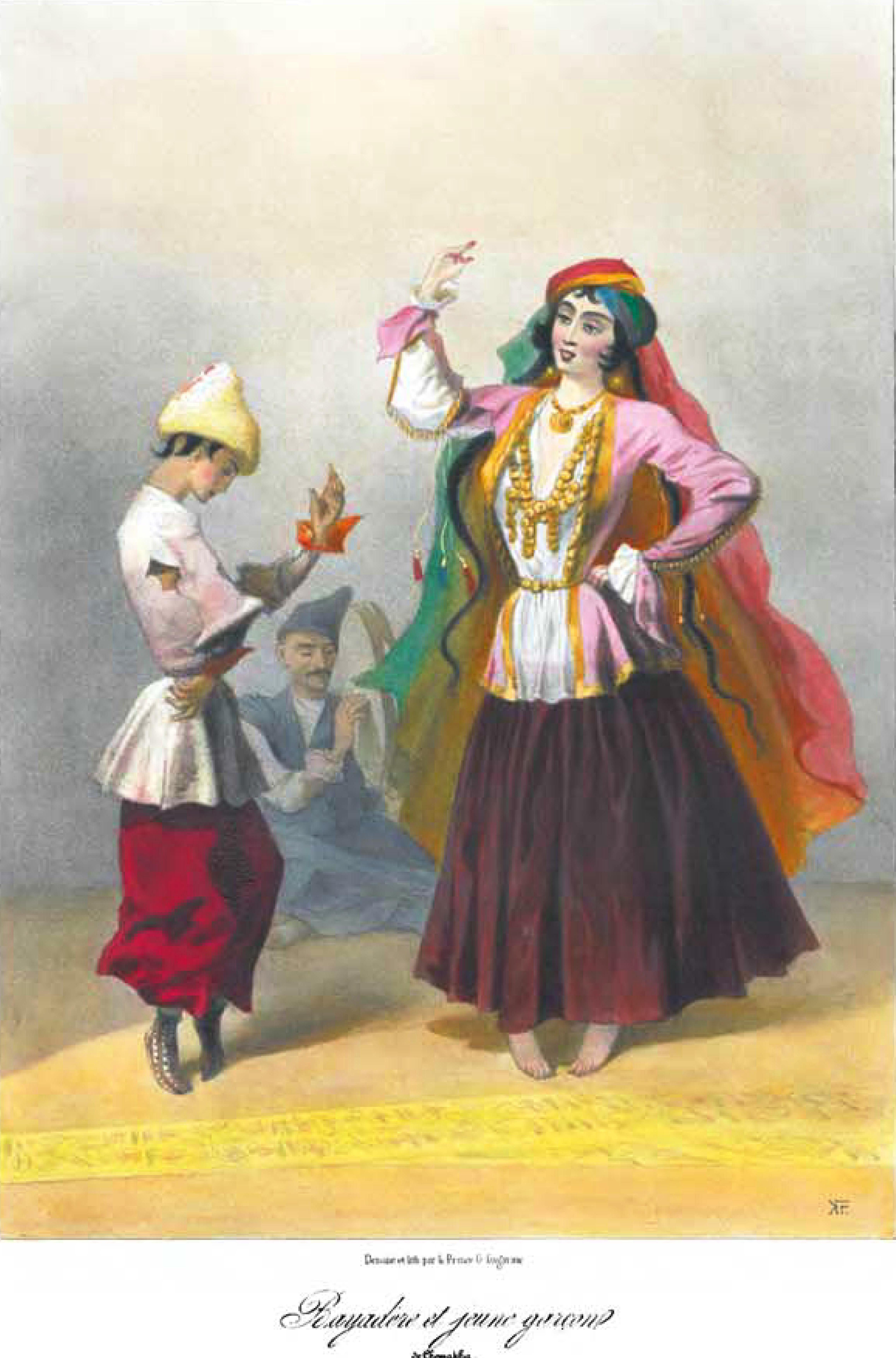 Scènes, paysages, moeurs et costumes du Caucase dessinés d'aprés nature par le prince G. Gagarine.